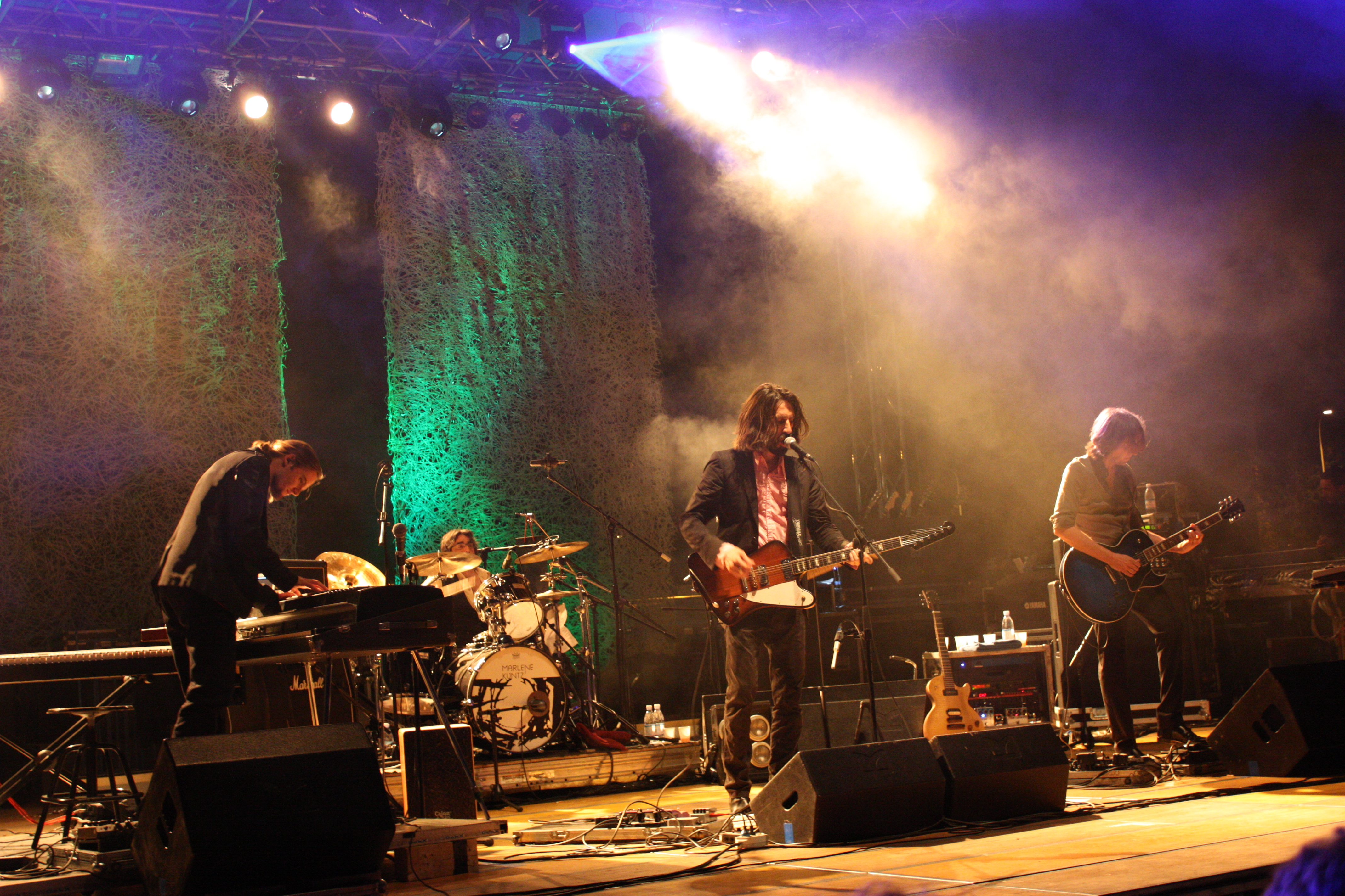 Marlene Kuntz in concerto a Calusco d'Adda